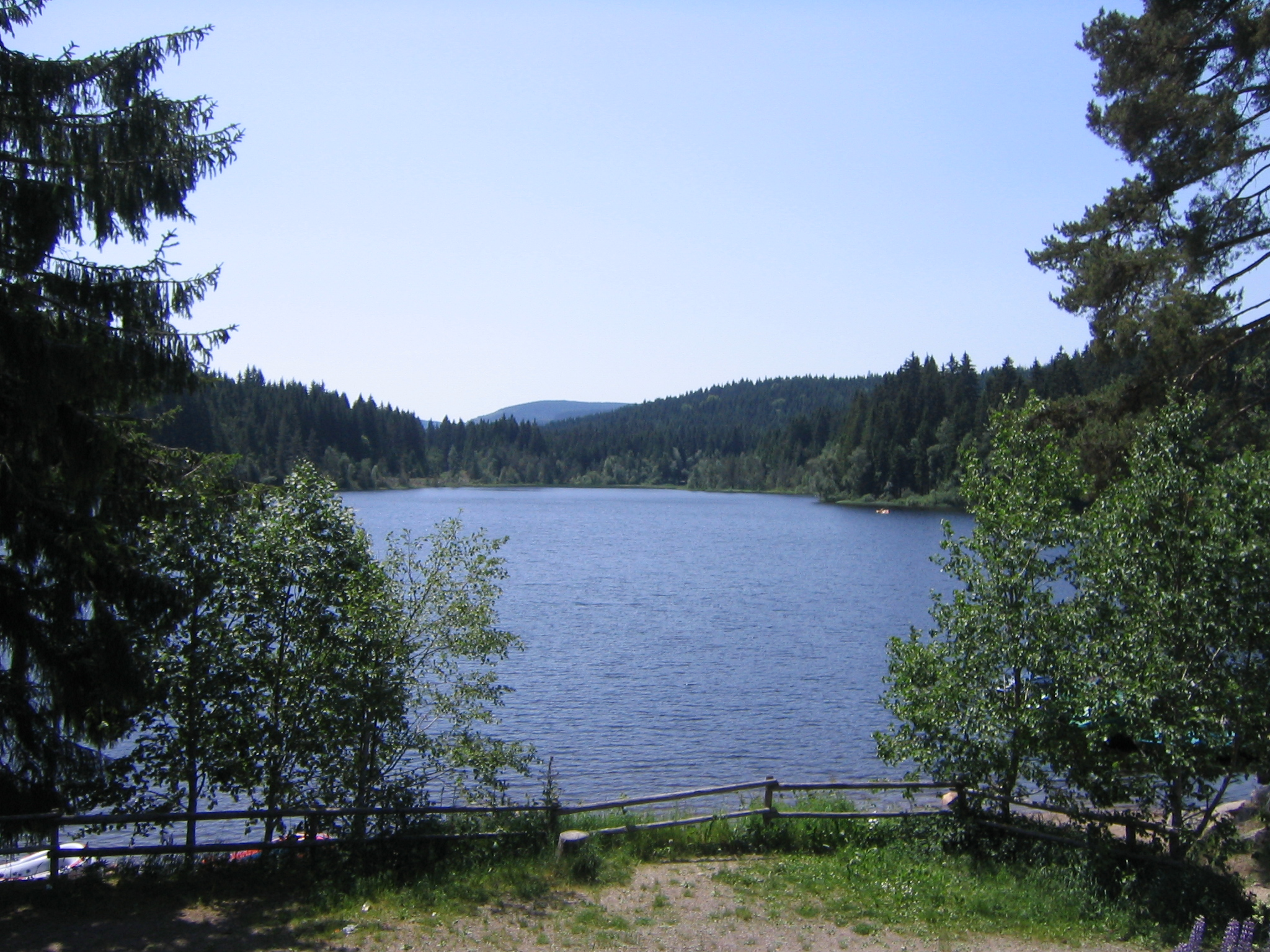 Windgfällweiher, Gemeinde Feldberg, Baden-Württemberg, Deutschland